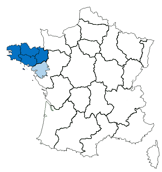 Localisation Bretagne Historique en France